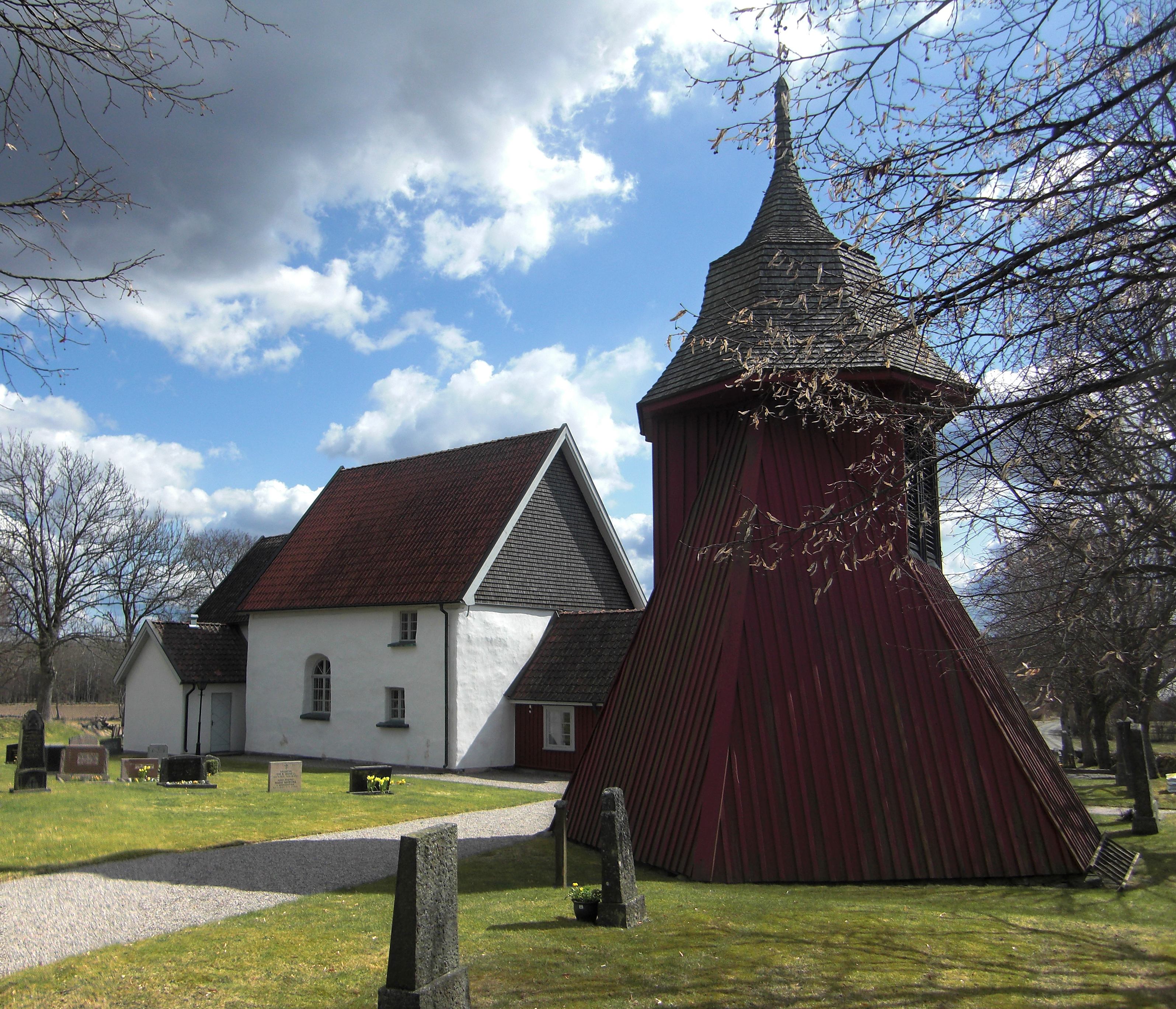 Exteriör av Mjäldrunga kyrka med klockstapel i Mjäldrunga socken, Gäsene härad, Herrljunga kommun, Skara stift, f.d. Älvsborgs län, Västergötland, Västra Götalands län, Sverige.